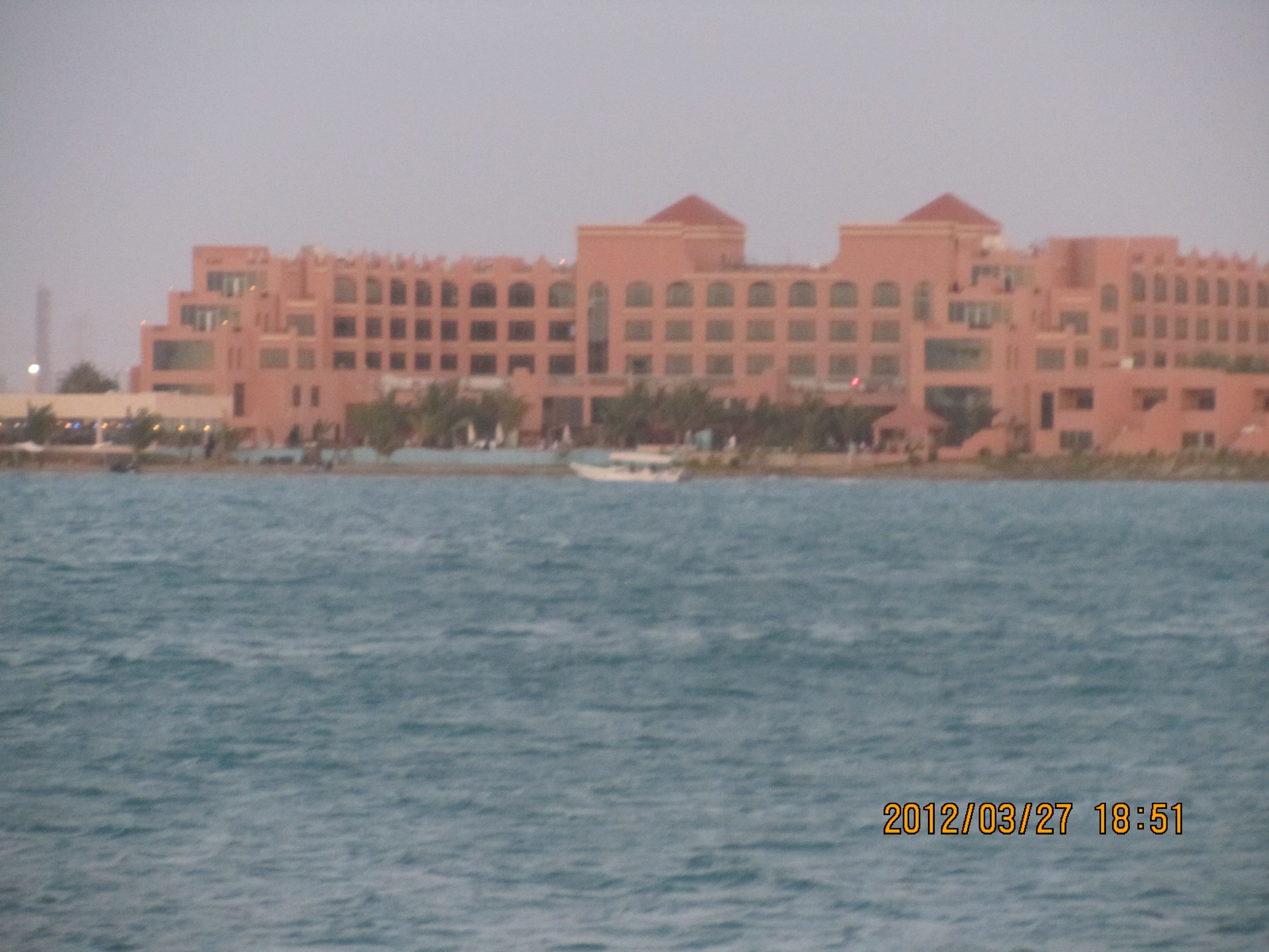 Yanbu Al Sinaiyah, Yanbu Saudi Arabia